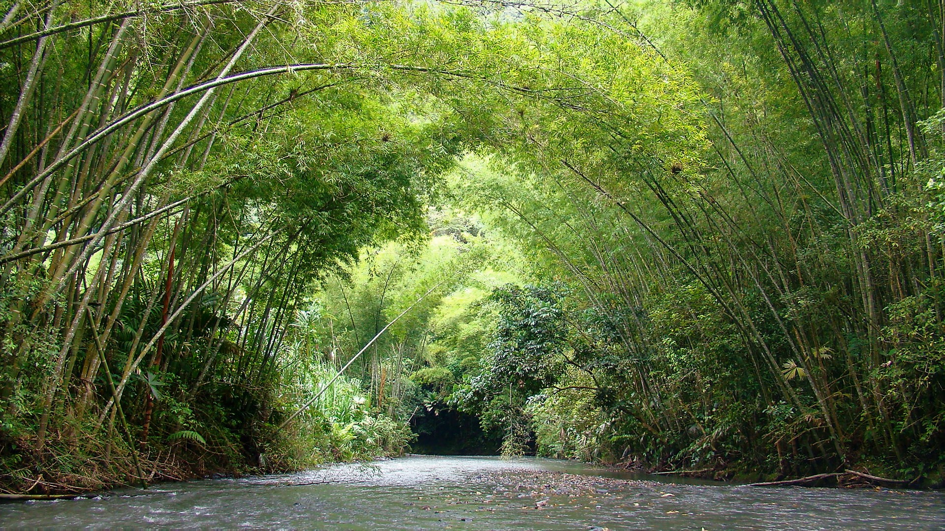 Es costumbre del Palmero realizar "Paseos de olla" al río con la familia y los amigos en las festividades (diciembre-enero).